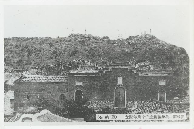 Takao Kougakkou (打狗公學校)